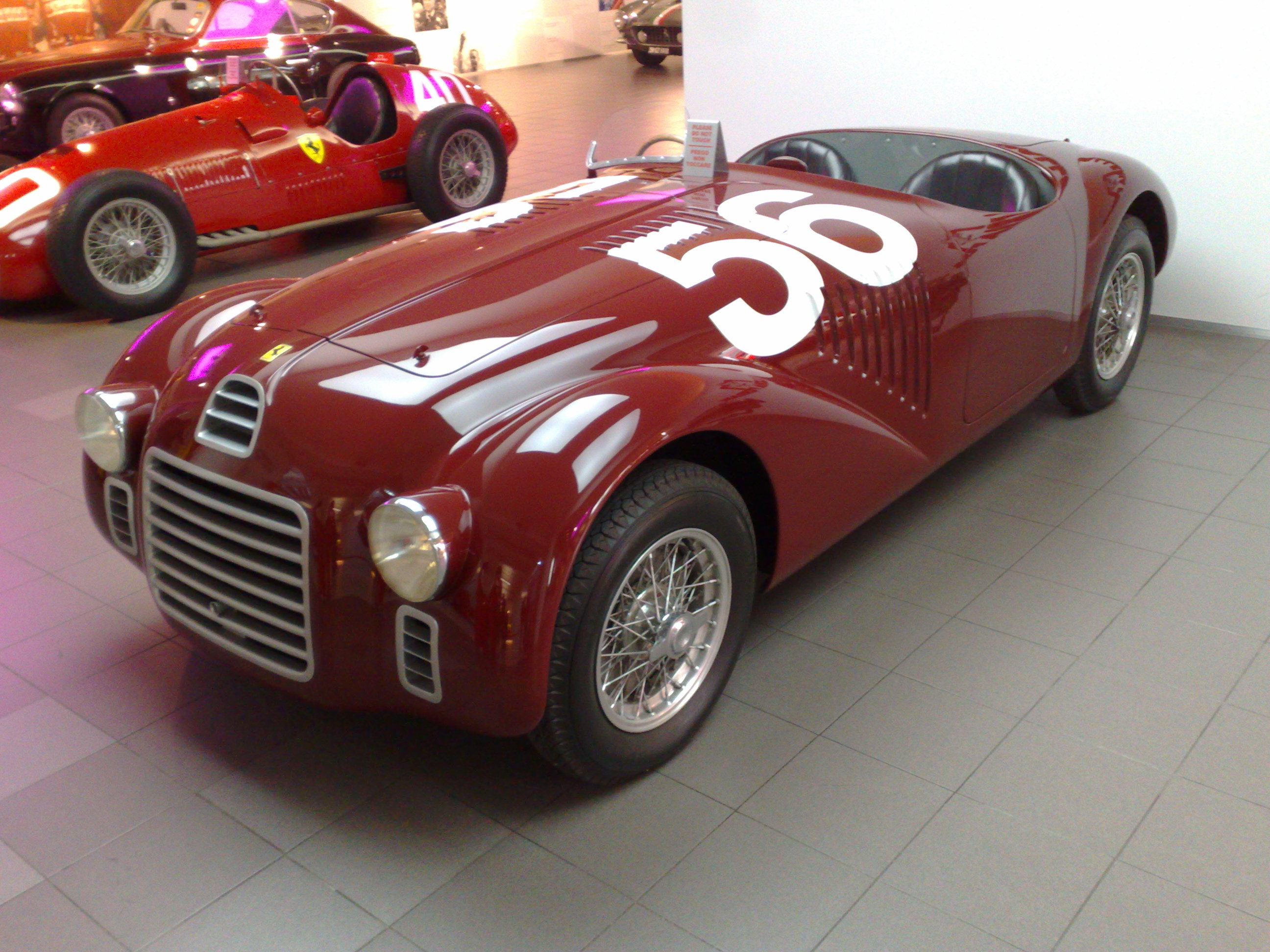 Replica di una Ferrari 125 S, Fotografata alla Galleria Ferrari di Maranello.